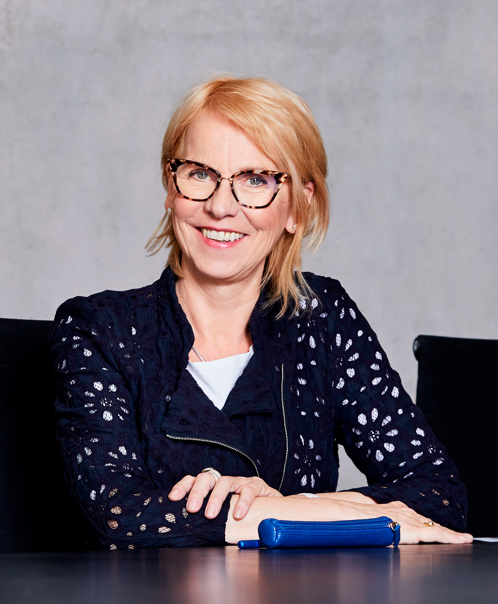 Karin Kraus (2019), fotografiert von Katharina Dubno